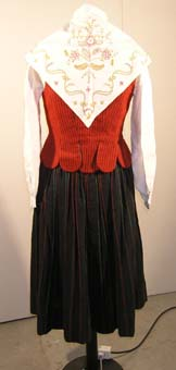 Titel SLM 14088 - Folkdräkt från Floda i Södermanland Anmärkning Folkdräkt från Floda i Södermanland bestående av: svartrandig yllekjol, rödrandigt livstycke, blått midje förkläde, röd bindmössa, stycke, vitt broderat halskläde, broderimönster till halskläde, röda strumpor (långa) i fodral, röda (knä) strumpor, röda (ylle) strumpor, överdel av vitt linne, silver brosch med ask och 3 st silverknappar. Astrid fick denna Flodadräkt tillsammans med Västra Vingåkers dräkten (SLM 14087) på 1960-talet då hon dansade i folkdanslaget i Stockholm. De inköptes på Hemslöjden i Nyköping. Hon broderade halsklädet till Floda dräkten själv. Hon använde dräkterna vid högtidliga tillfällen och när hon dansade. Astrids pappa Gustaf Gustafsson född 1881 kommer i från Stora Malm i Floda socken och Astrids mamma Ester Kristina född 1894 kommer i från Söderspånga, Västra Vingåkers socken.